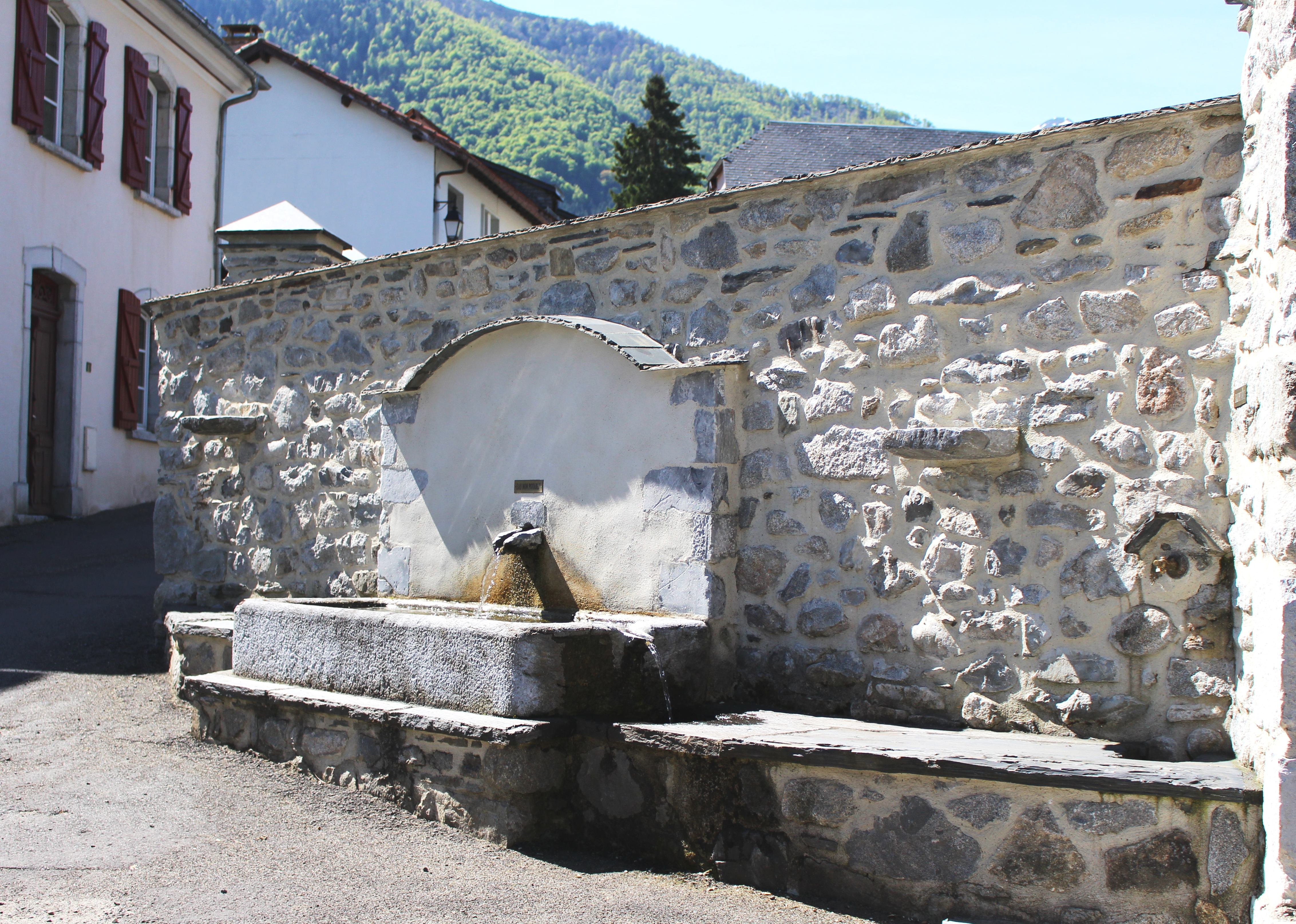 Fontaine de Bun (Hautes-Pyrénées)